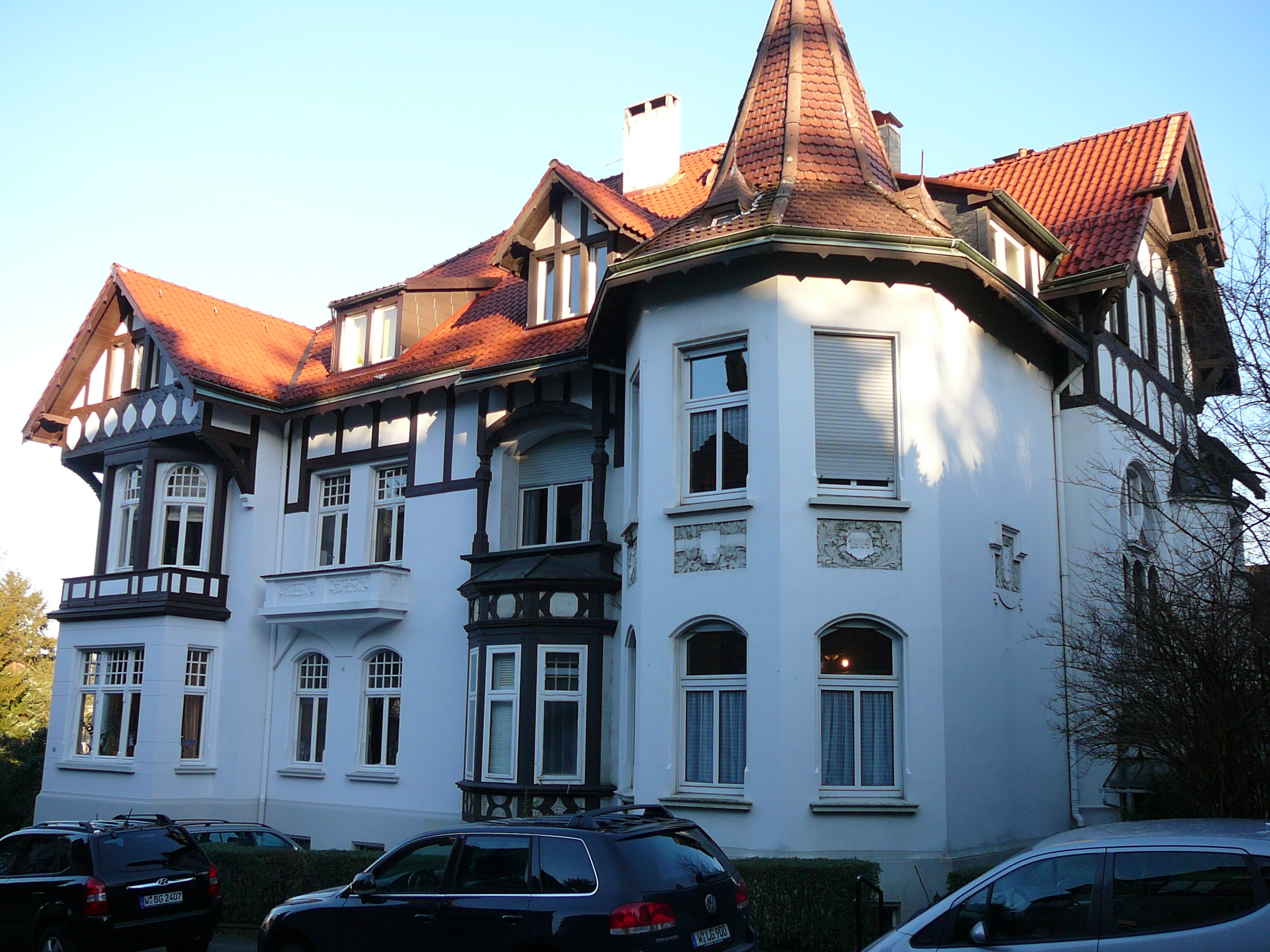 Villa im Briller Viertel, Moltkestr, Wuppertal